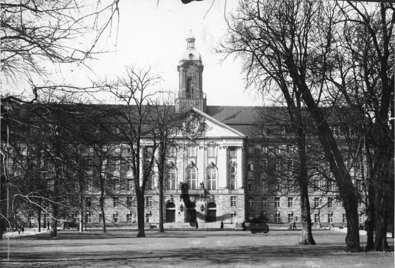 Berlin, Kammergericht ADN-ZB-Archiv Das Kammergericht in der Elßholzstrasse in [Berlin-] Schöneberg 15.3.1938 3491-38 [Scherl Bilderdienst]